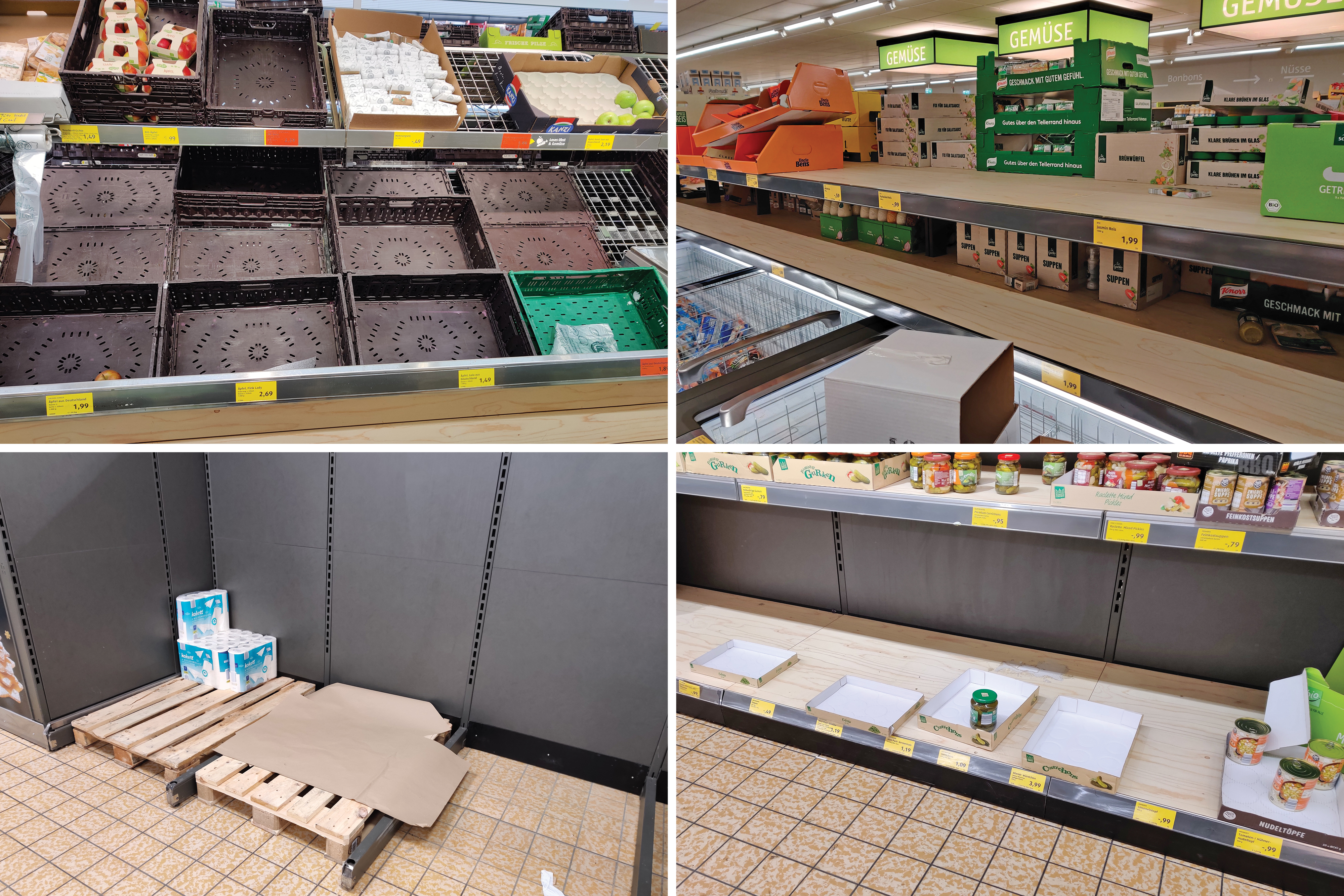 Erhöhte Nachfrage nach Produkten wie Obst, Reis, Lebensmittelkonserven und Toilettenpapier infolge der COVID-19-Pandemie, aufgenommen in einem Discounter in Baden-Württemberg.